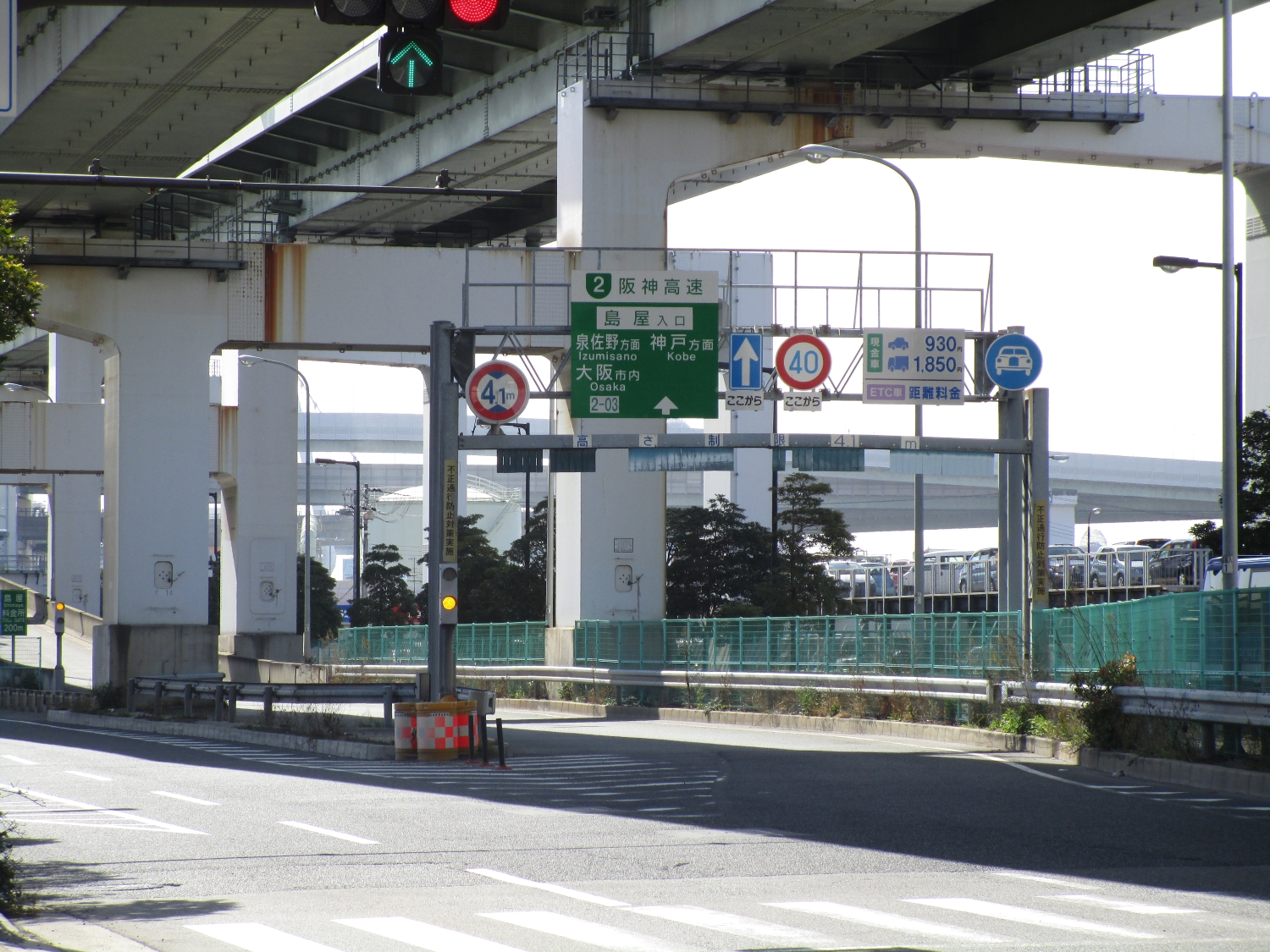 阪神高速2号淀川左岸線・島屋入口